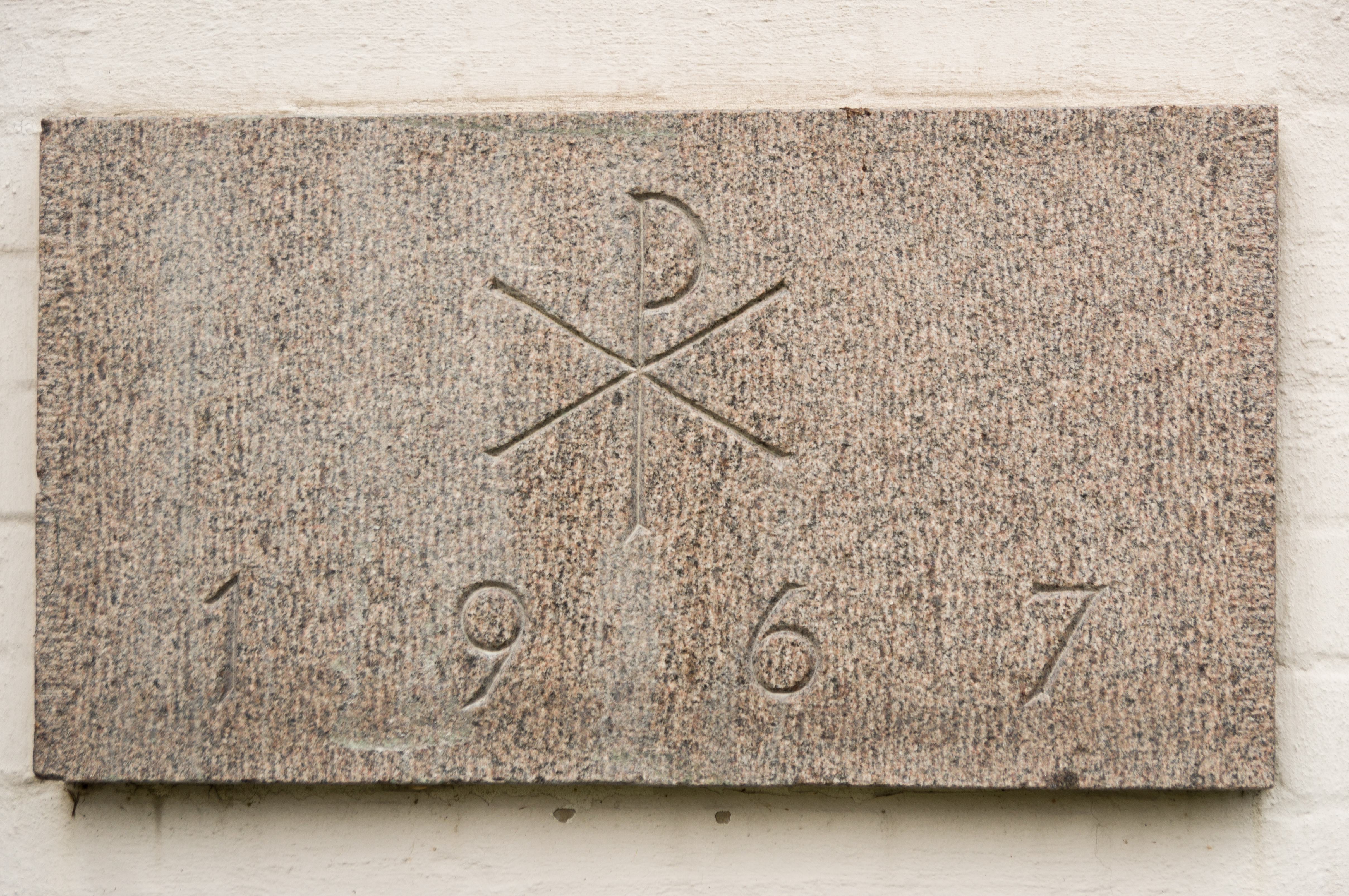 Flensburg-Weiche, An der Friedenskirche 20. Jahresstein der Friedenskirche in Flensburg